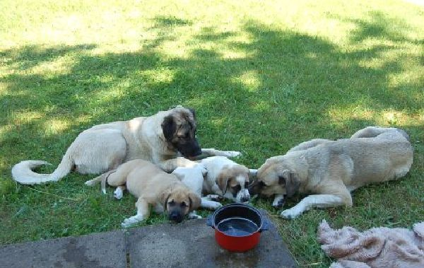 Autor: Ivonne Neumann Quelle